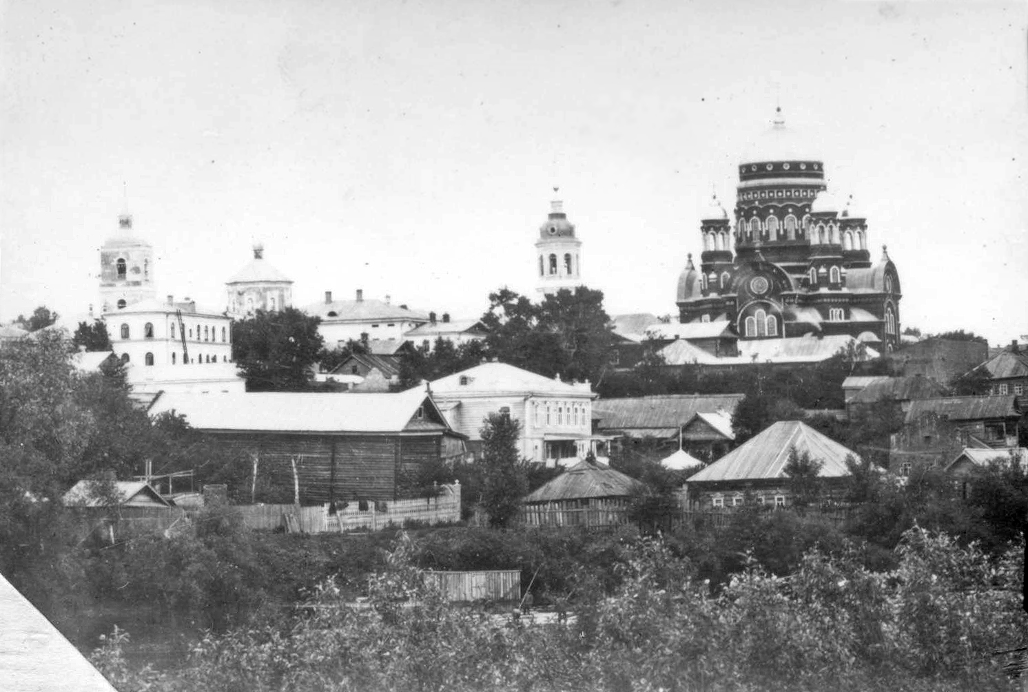 дореволюционный Уржум. Троицкий и Воскресенский соборы